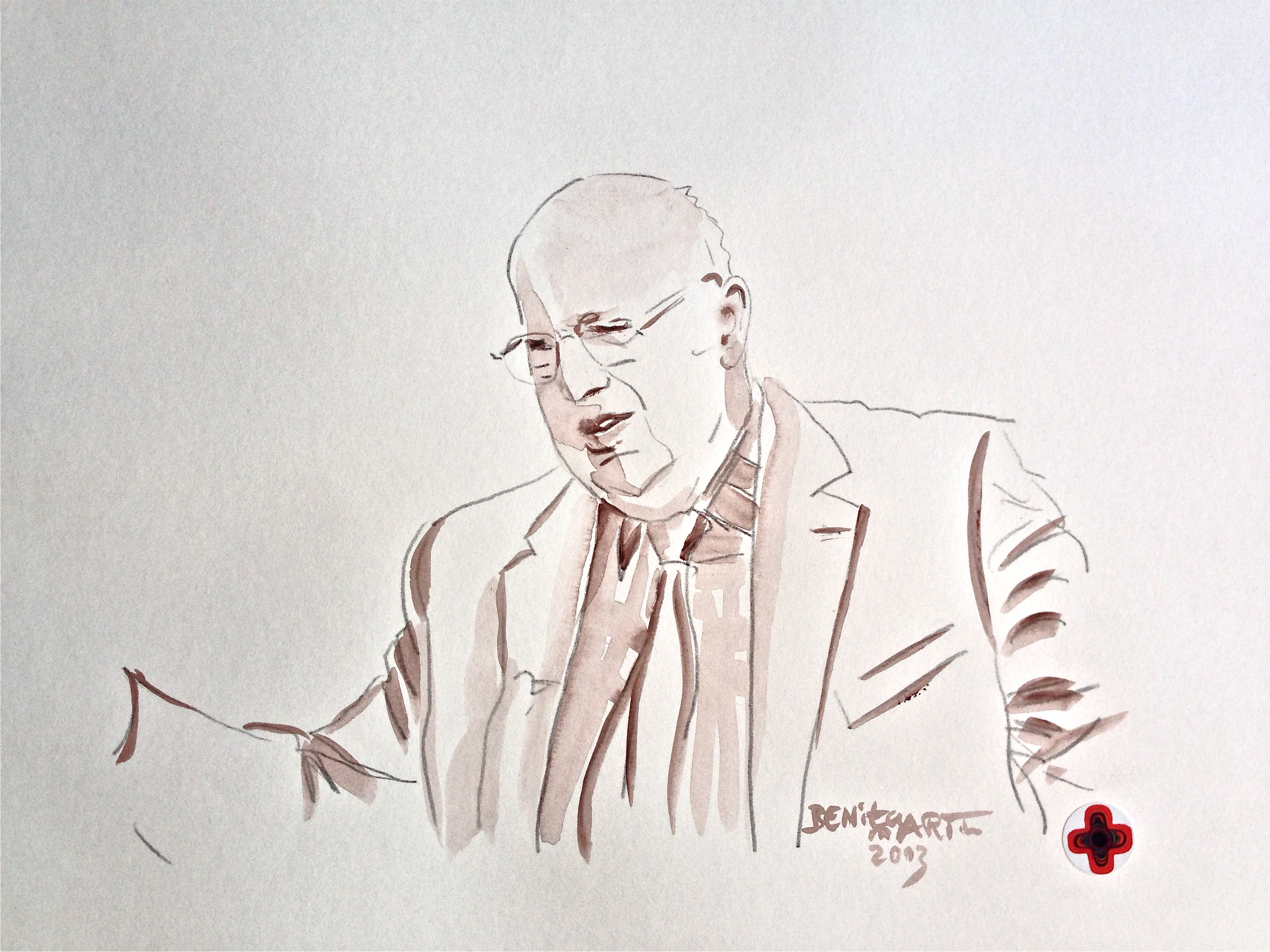 Addi Jacobi, Chemnitz - Porträt, Acryl, Blei, Kohle, ADA Dimensionsmalerei®, Benita Martin